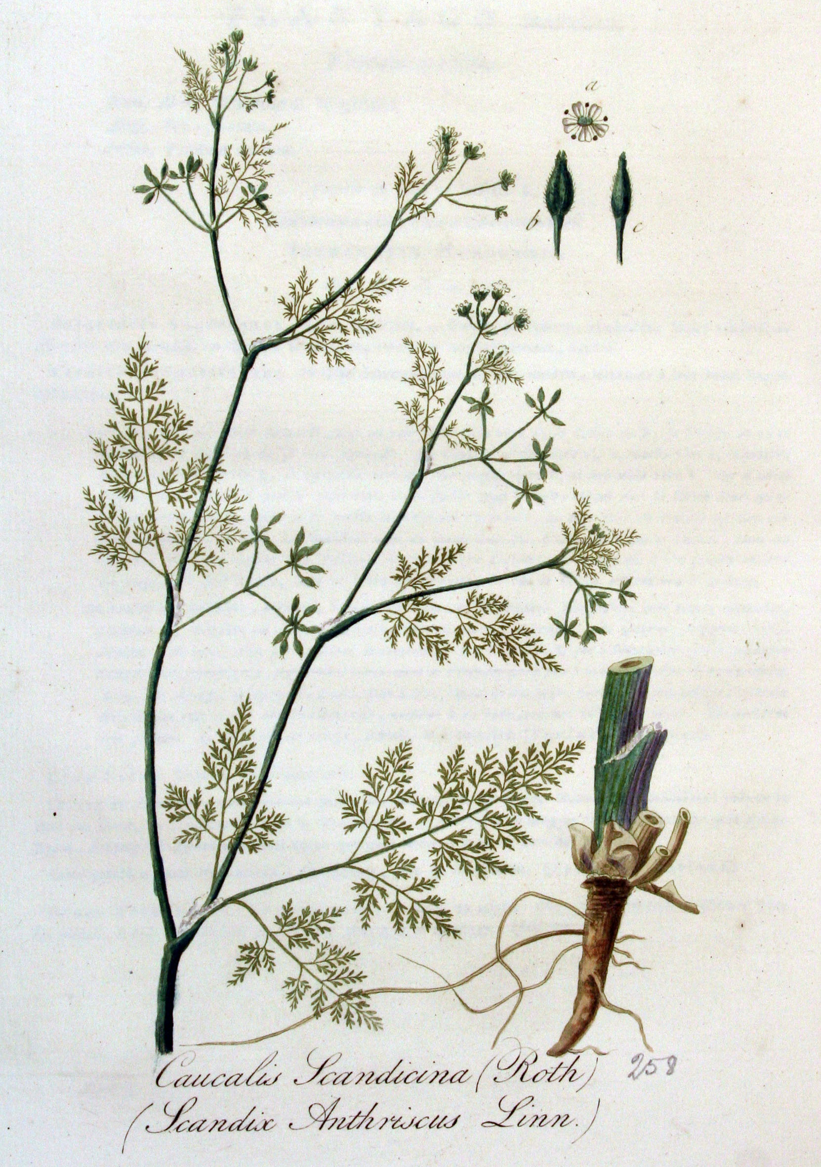 Anthriscus caucalis Bieb. (Syn. Caucalis scandicina Roth)